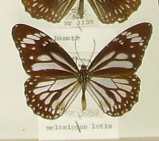 Danaus melanippus lotis